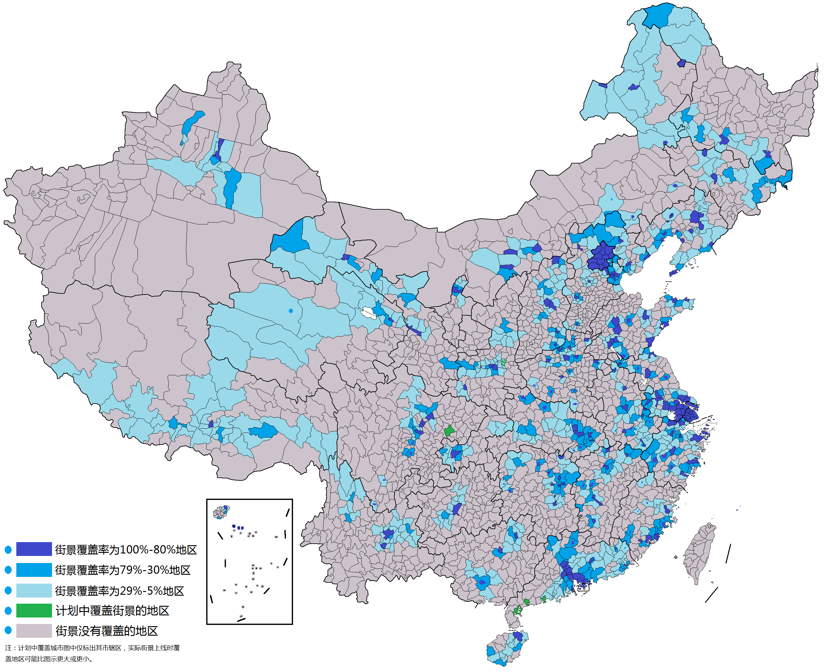 此图为SOSO街景地图覆盖地区示意图，深蓝色表示完全覆盖街景，蓝色表示大部分覆盖街景，浅蓝色表示部分道路覆盖街景，绿色表示计划中覆盖街景，灰色表示无街景覆盖。